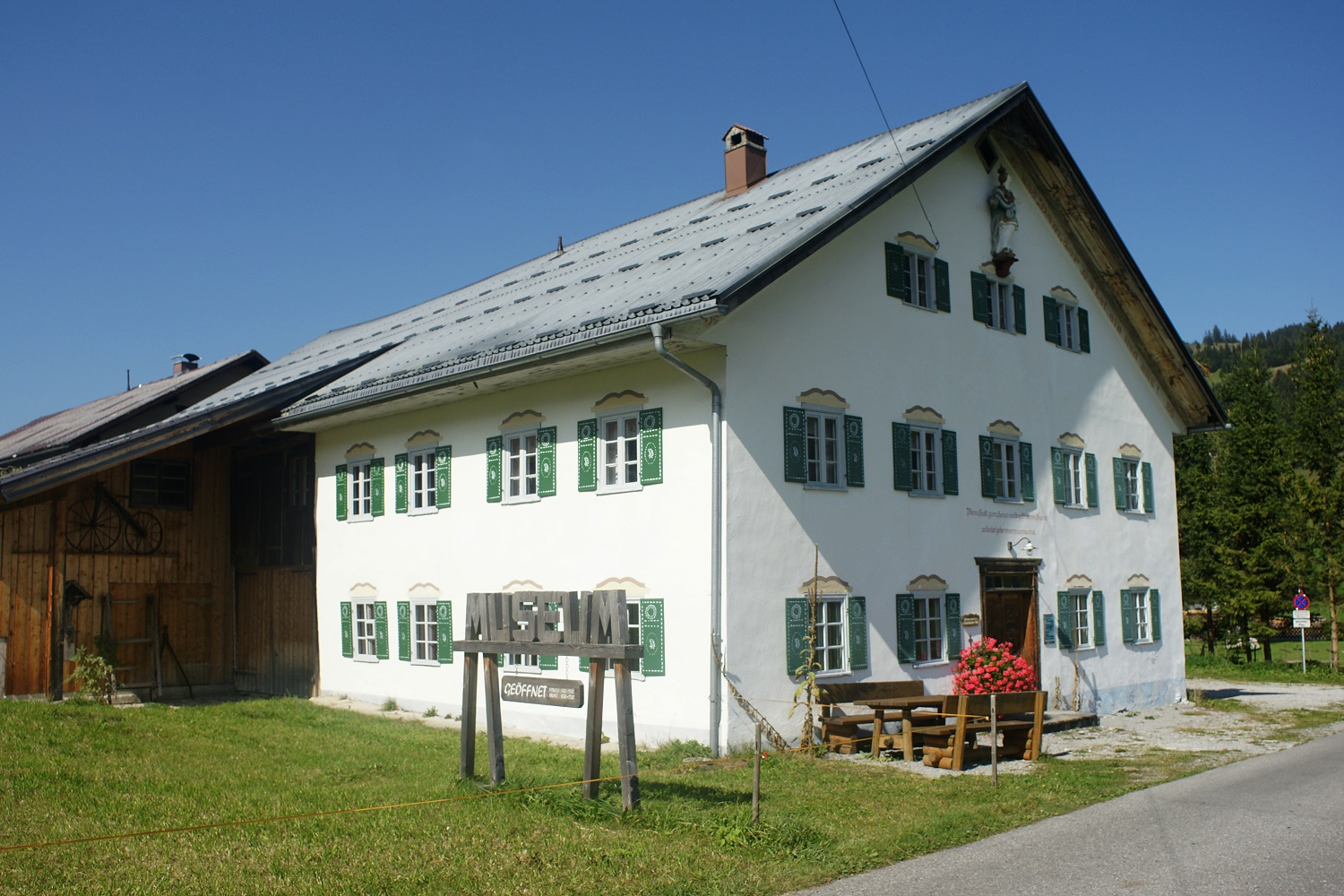 Heimatmuseum This media shows the remarkable cultural object in the Austrian state of Tyrol listed by the Tyrolean Art Cadastre with the ID 24656. (on tirisMaps, pdf, more images on Commons, Wikidata)